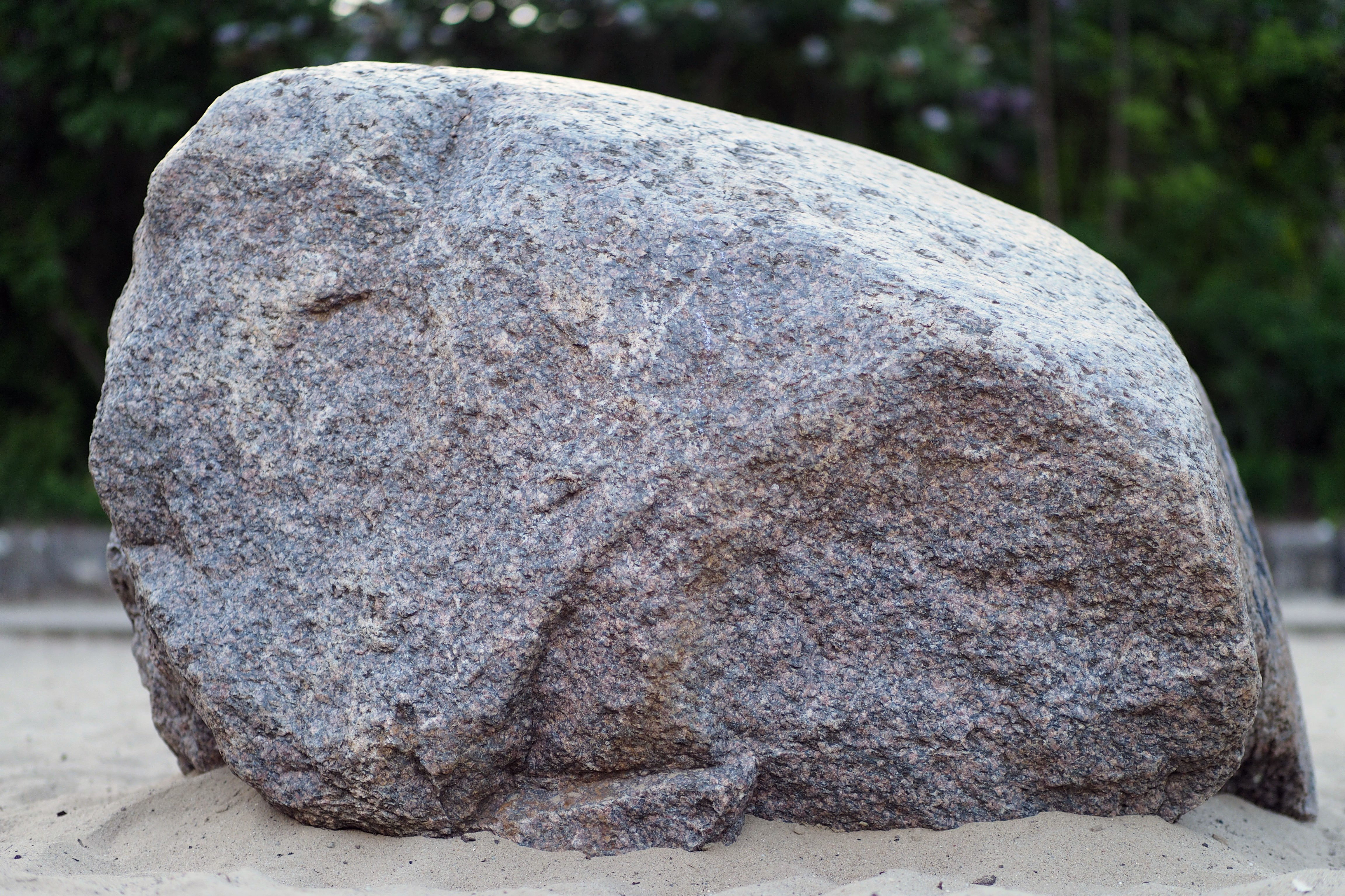 Naturdenkmal 7-6/F auf dem Spielplatz Alboinplatz, größerer der beiden Findlinge